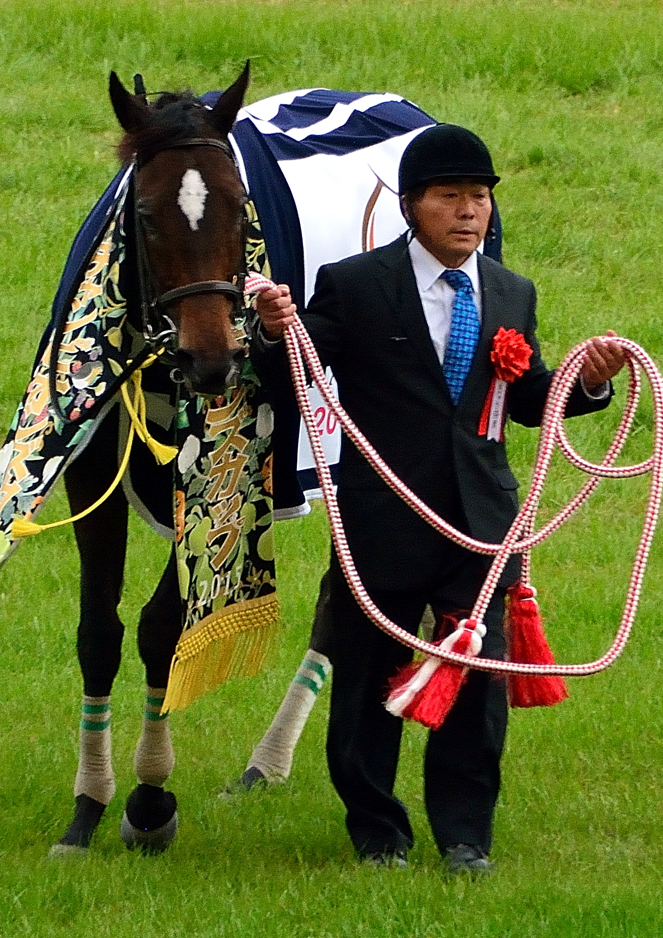 2015年12月6日（日）に中京競馬場の第11競走で行われた第16回チャンピオンズカップで、勝利馬のサンビスタと担当厩務員の嘉堂信雄調教助手が表彰式前に本場場で待機している場面を、観客席から撮影したもの。